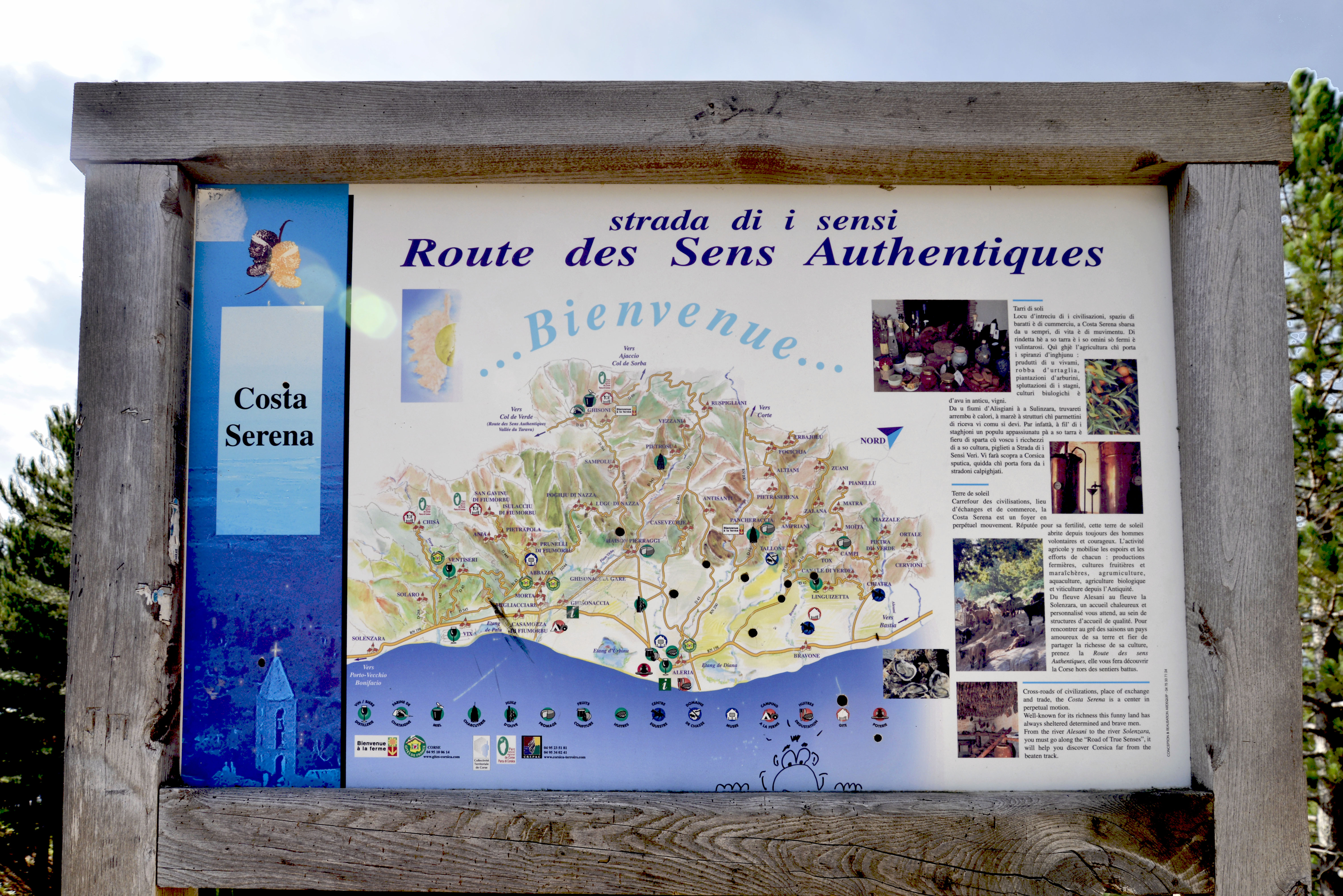 Ghisoni, Fiumorbo (Corse) - Panneau de bienvenue en Costa Serena de l'association Strada di i sensi au col de Sorba